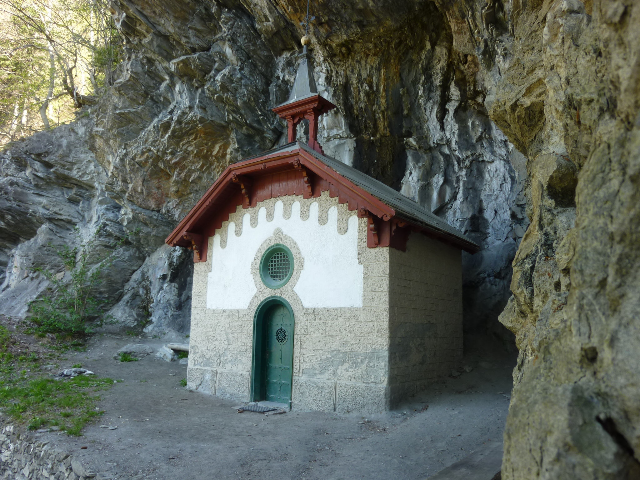 St. Luzikapelle St. Luzikapelle